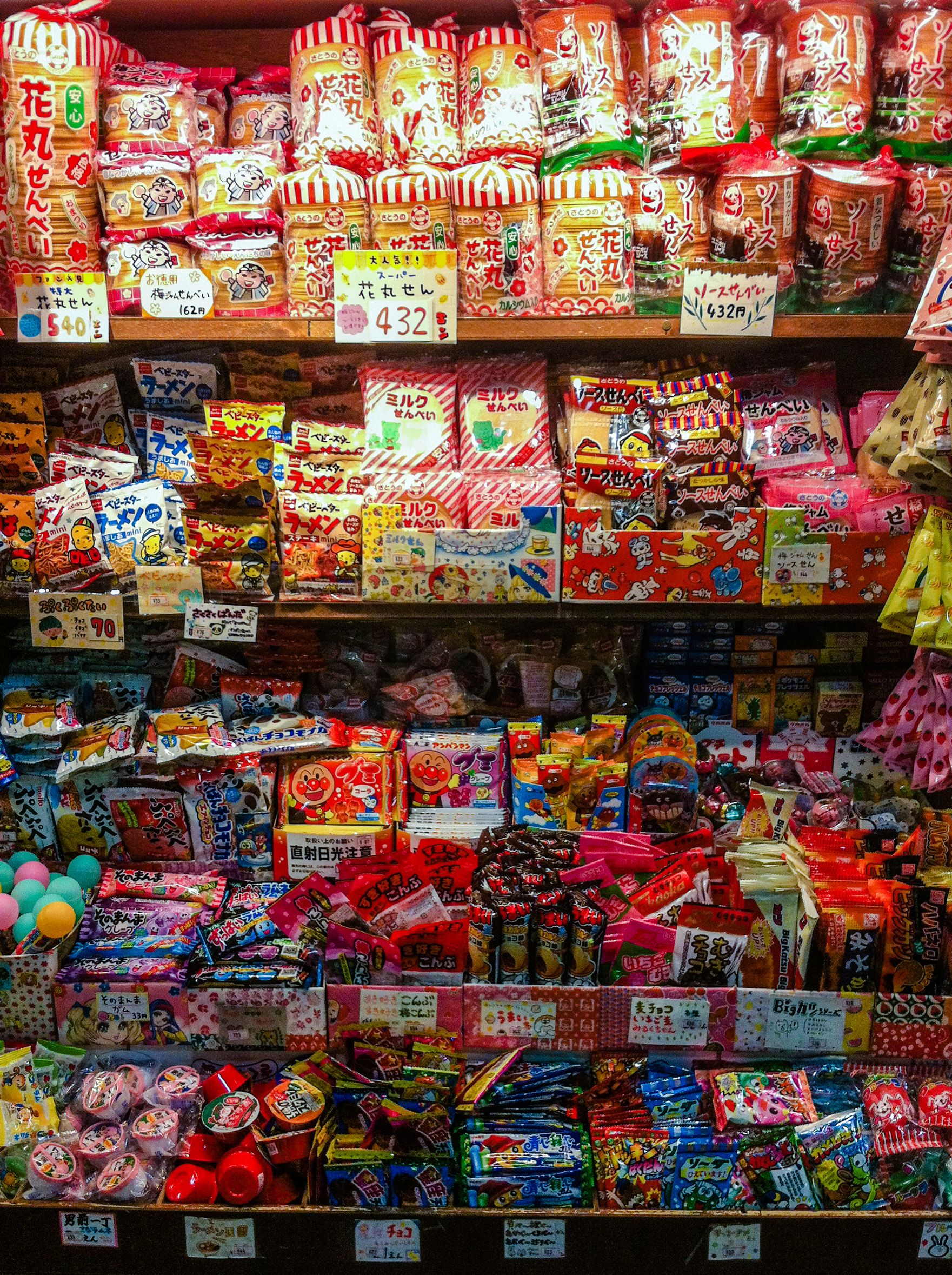 Chuches